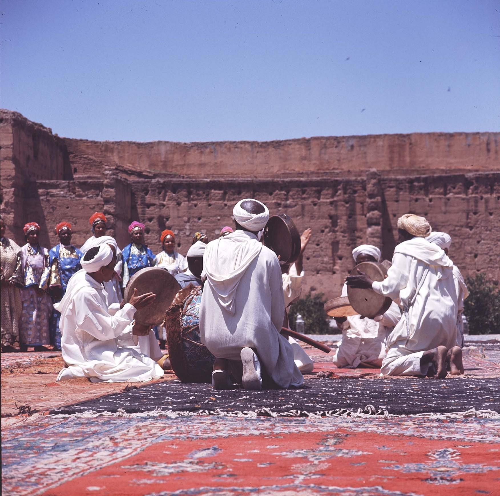 De dansgroep op de foto voert een Ahwash-dans uit Ouarzazate uit.